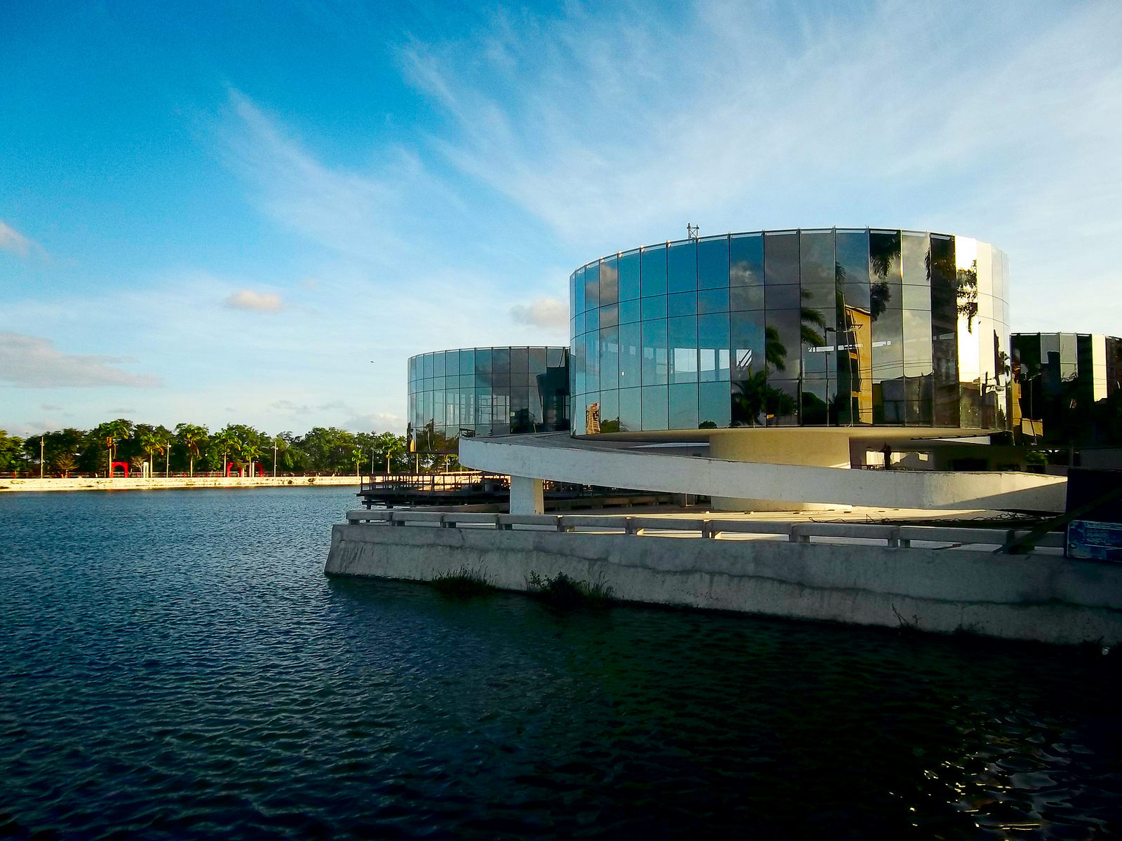 Museu de Arte Popular da Paraíba, ou Museu dos Três Pandeiros, projetado pelo arquiteto Oscar Niemeyer.